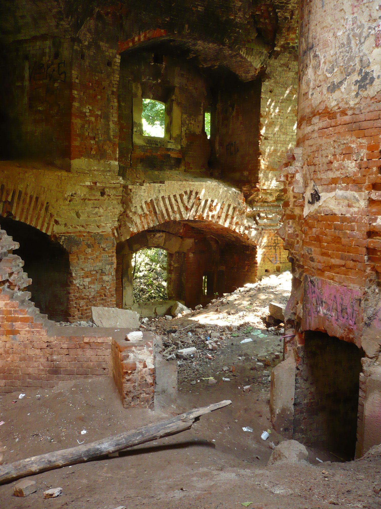 Lwów - wnętrze bastionu cytadeli